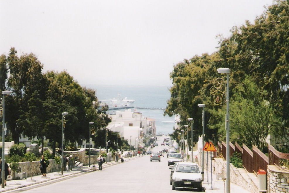 Der Büßerweg zur Marienkirche von Tinos